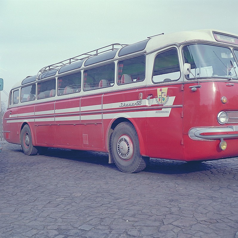 Original image description from the Deutsche Fotothek Fahrzeugscheiben